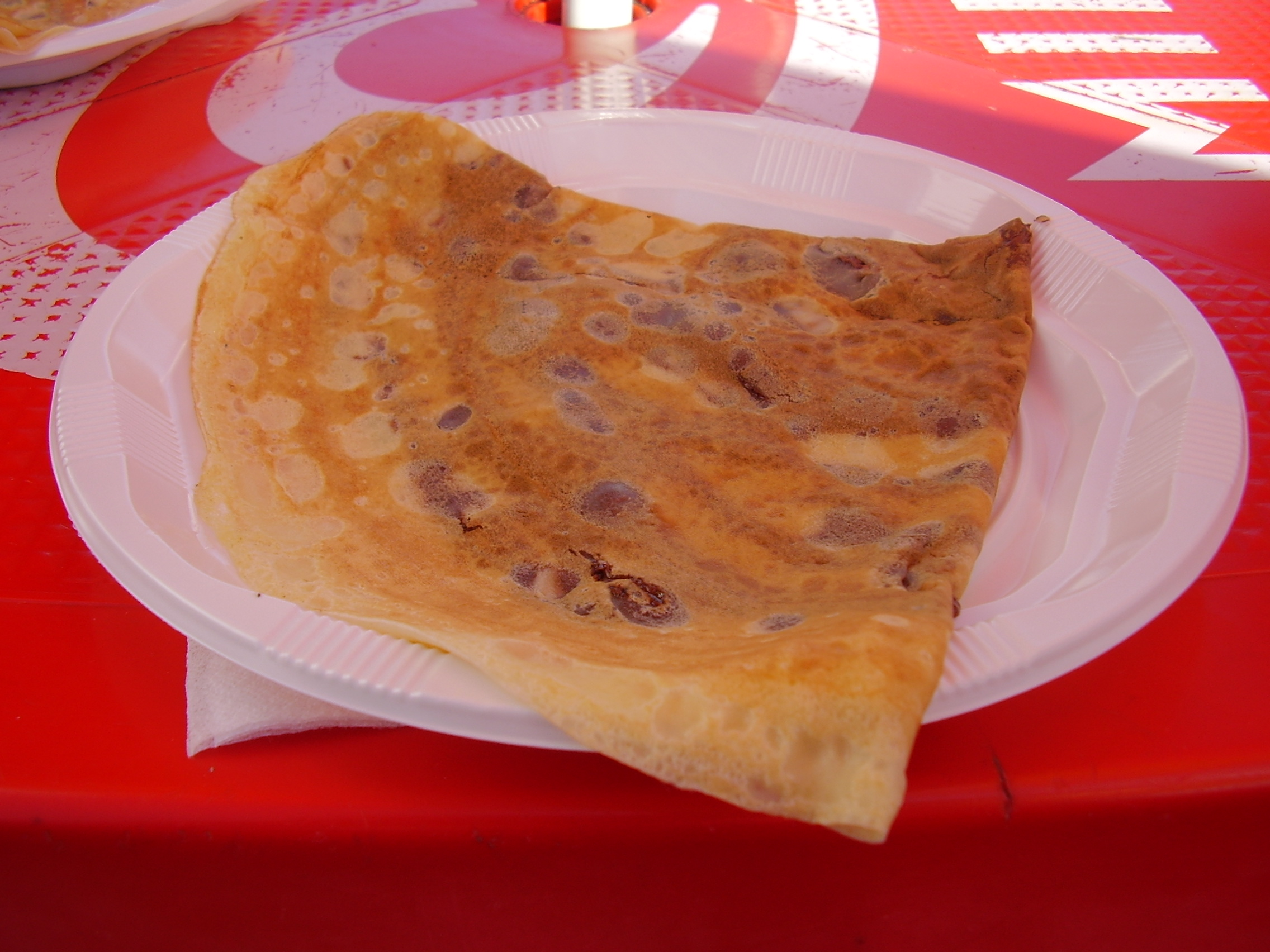 Roscoff, Bretagne; Frankreich